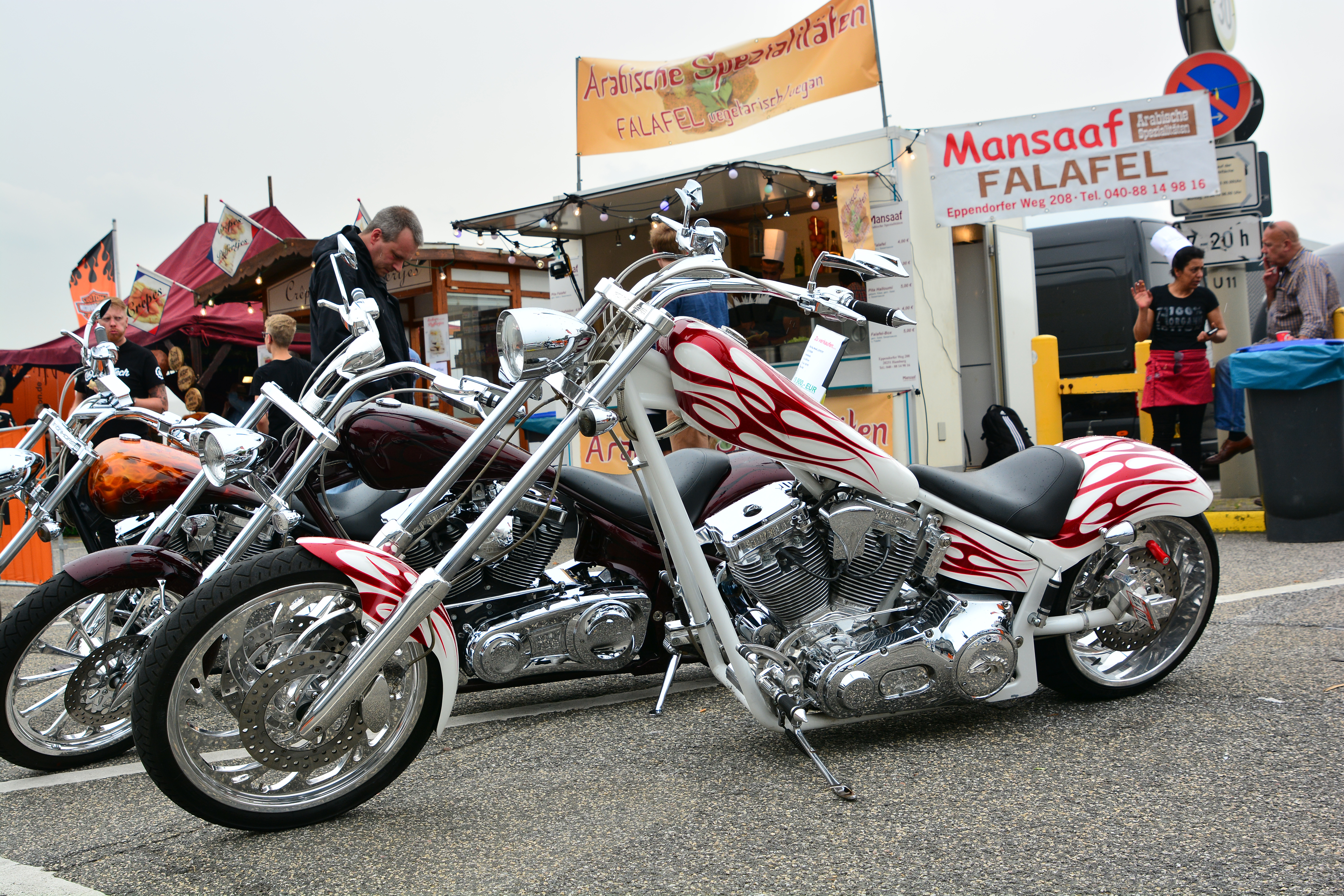 American Ironhorse Custom Texas Chopper 280 HR bei den „Hamburg Harley Days 2015“